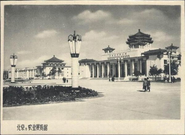 1959年的农业展览馆。